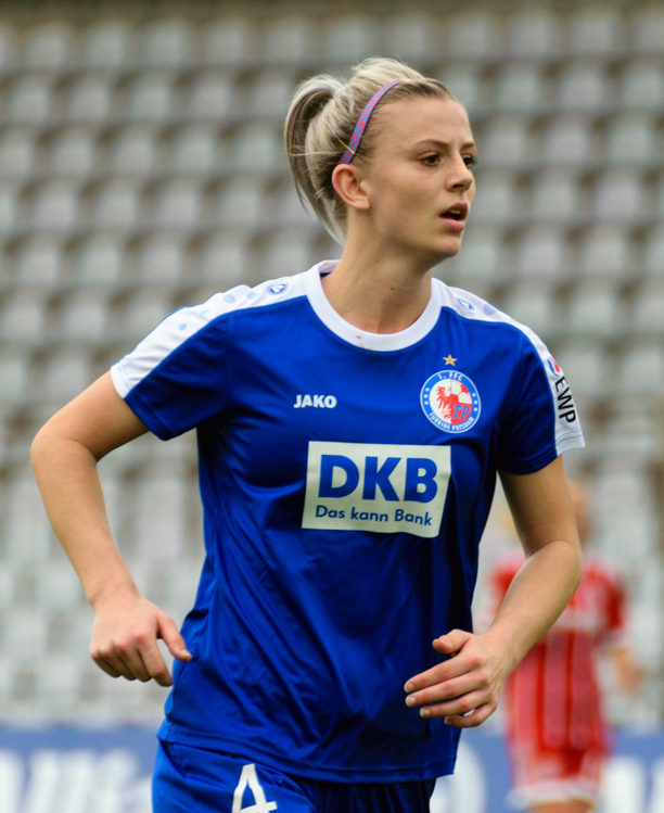 Johanna Elsig vs Bayern Munchen - DFB-Pokal